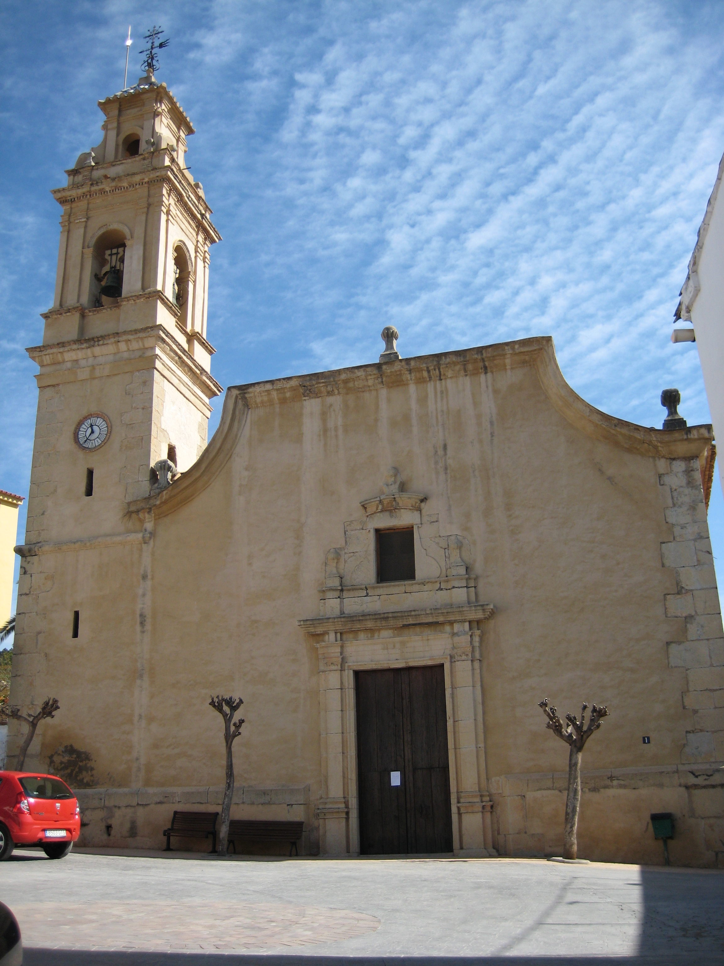 Façana de l'església de Sant Joan Evangelista de Vallat (Alt Millars)